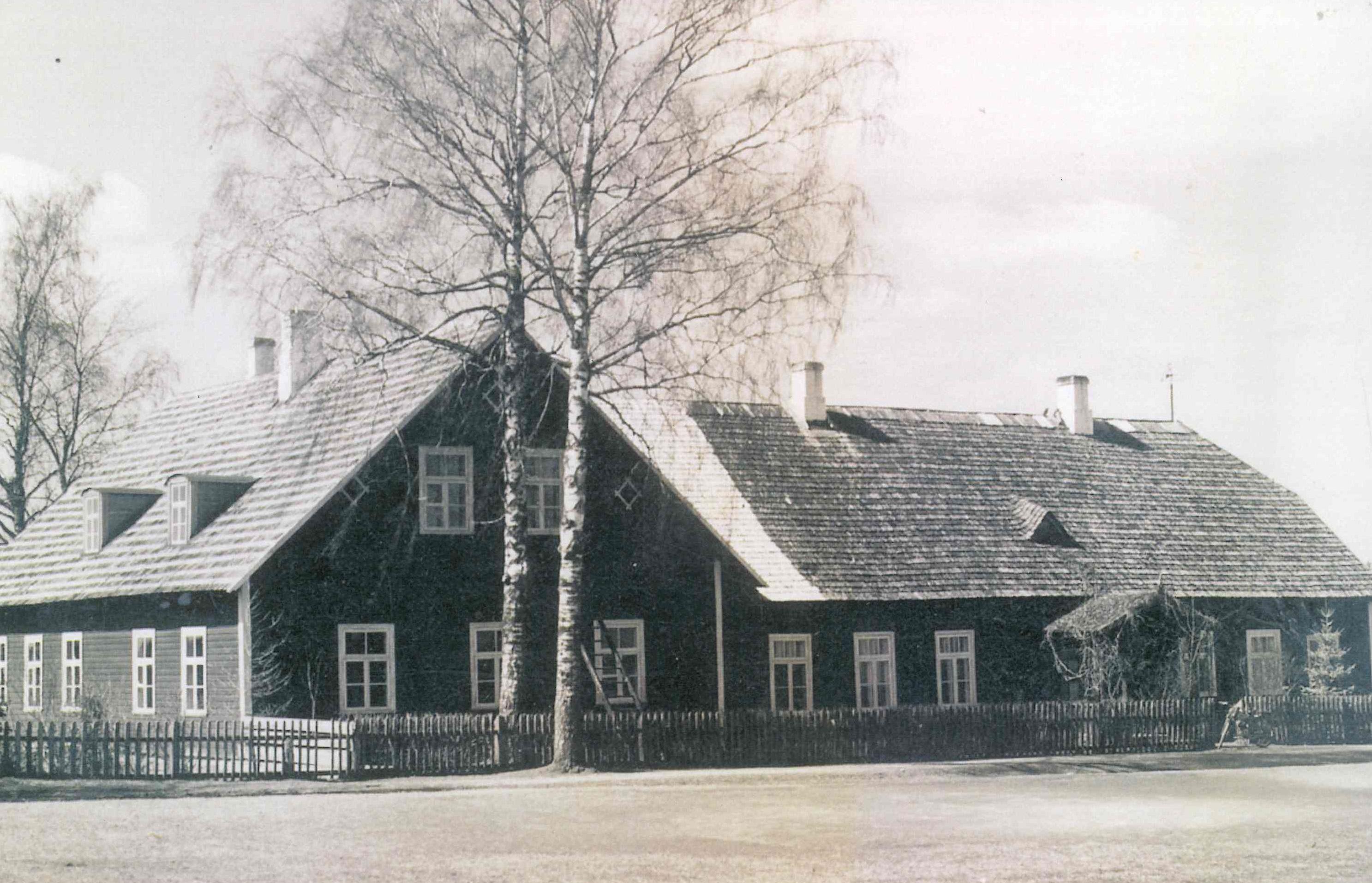 Vana kool.